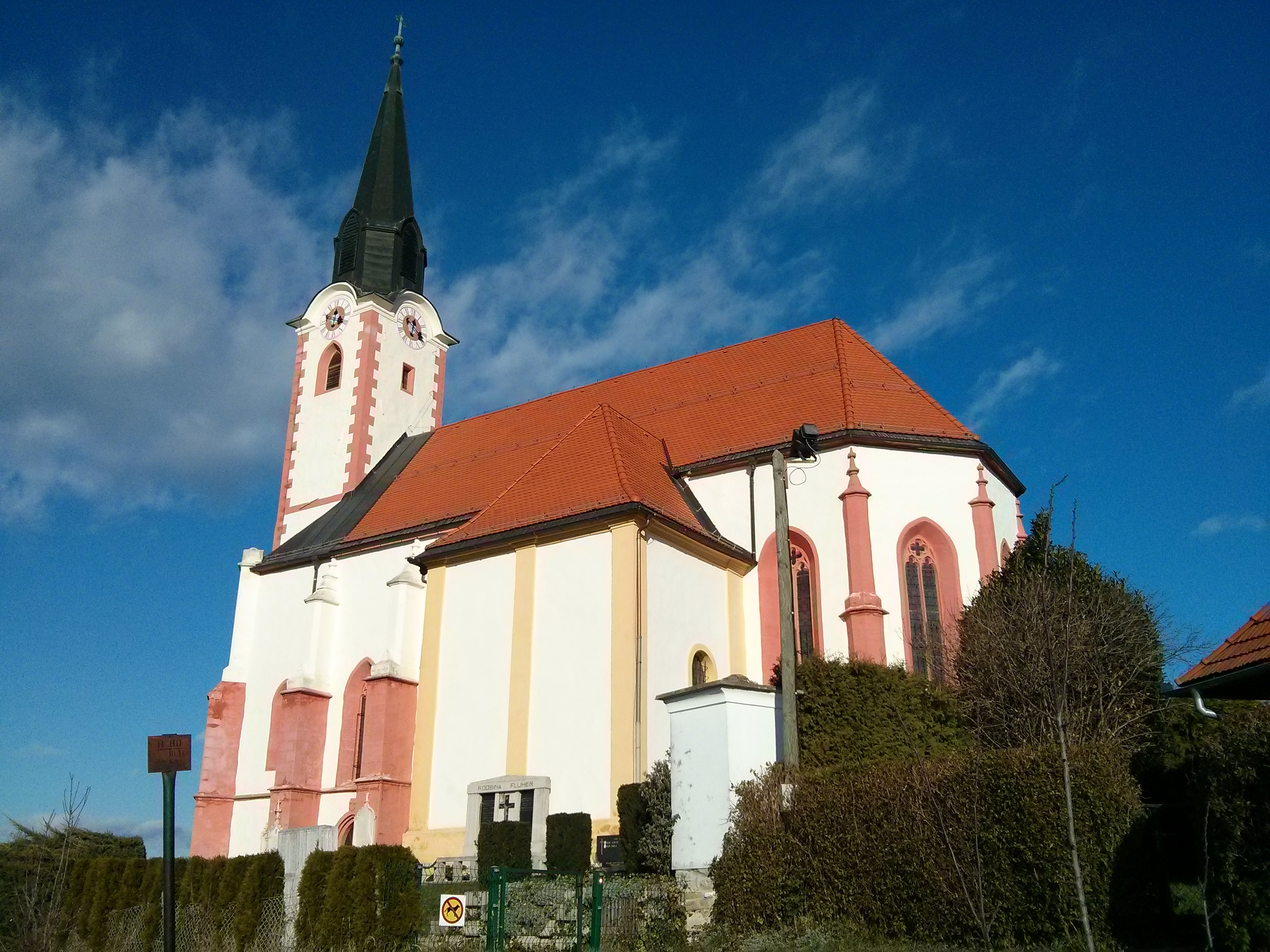 Cerkev Sv. Marija